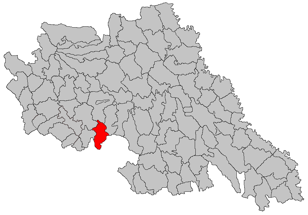 Categorie:Hărţi ale judeţului Iaşi